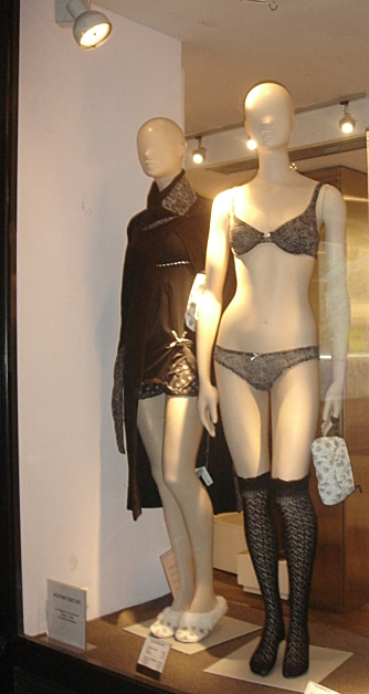 Devanture de magasin, Paris VIe, quartier Odéon